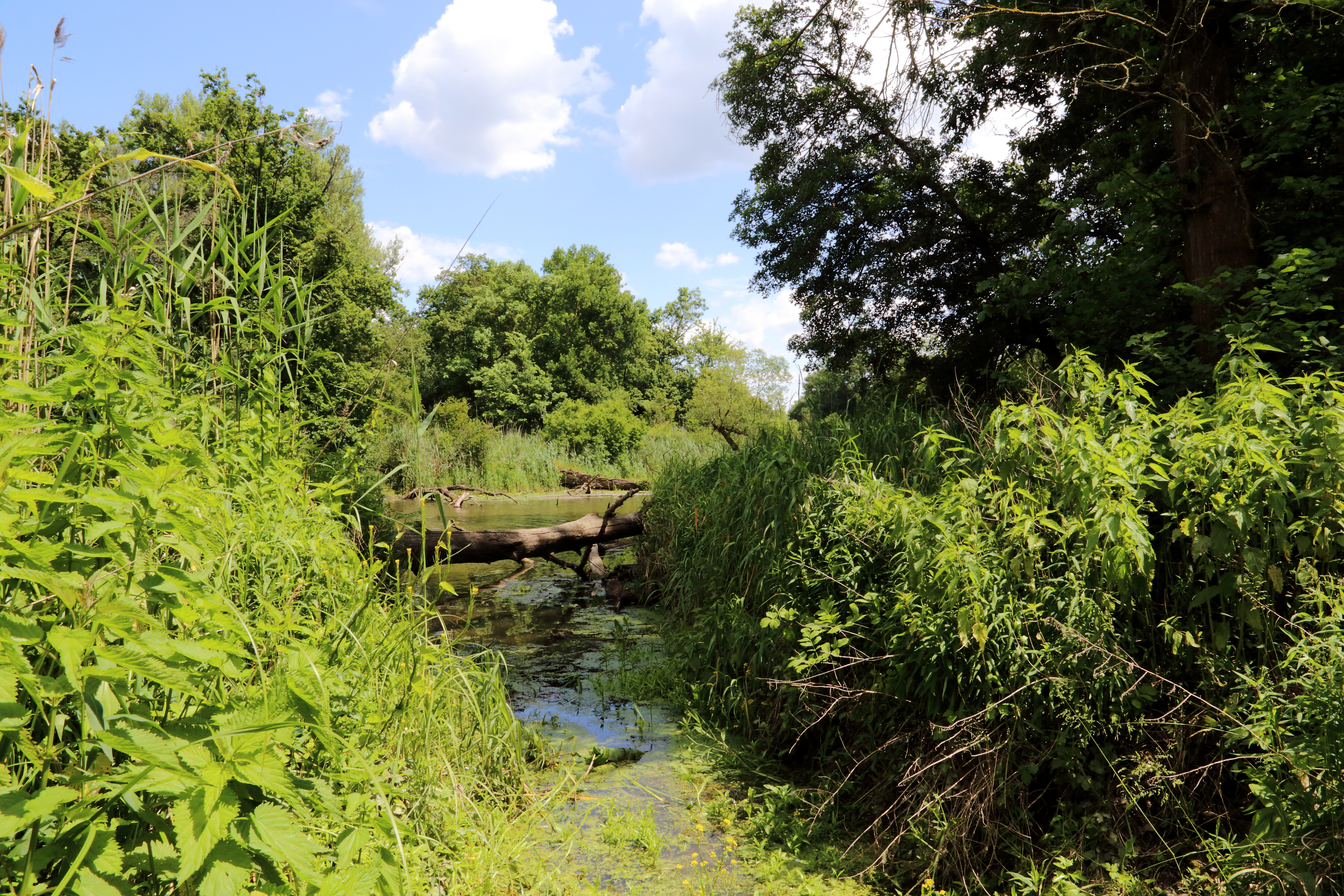 Das Naturreservat Marchauen nächst der Bernsteinstraße im Bereich der Gemeindegrenze von Weiden an der March (Ortsteil: Baumgarten an der March) und Marchegg. This media shows the nature reserve in Lower Austria with the ID 8.